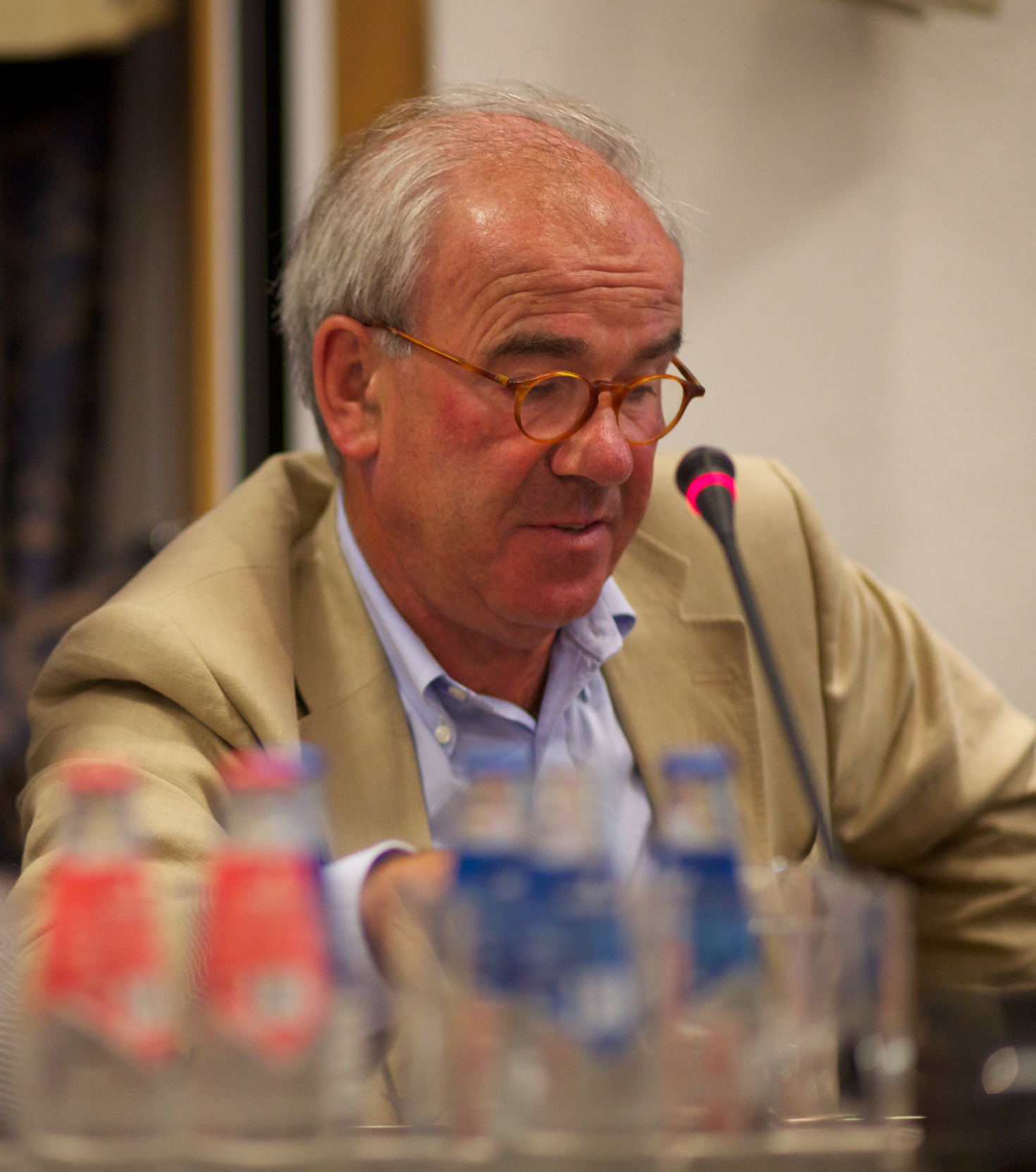 Ed van Thijn kijkt over de schouder van Frans Weisglas tijdens Nationaal Archief & Spaarnestad Photo join Wikipedia